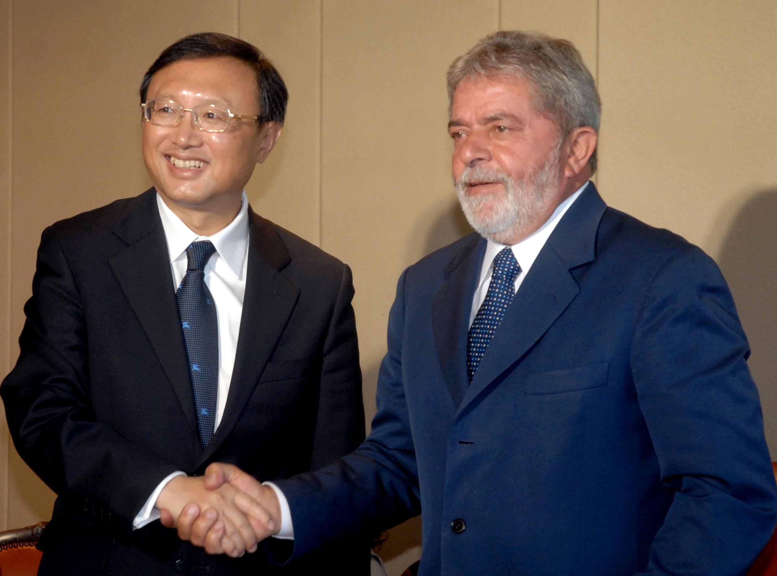 Brasília - O presidente Luiz Inácio Lula da Silva cumprimenta o Chanceler da República Popular da China, ministro Yang Jiechi, durante encontro para tratar da cooperação bilateral nas áreas de tecnologia, agricultura e energia Foto: Antônio Cruz/ABr